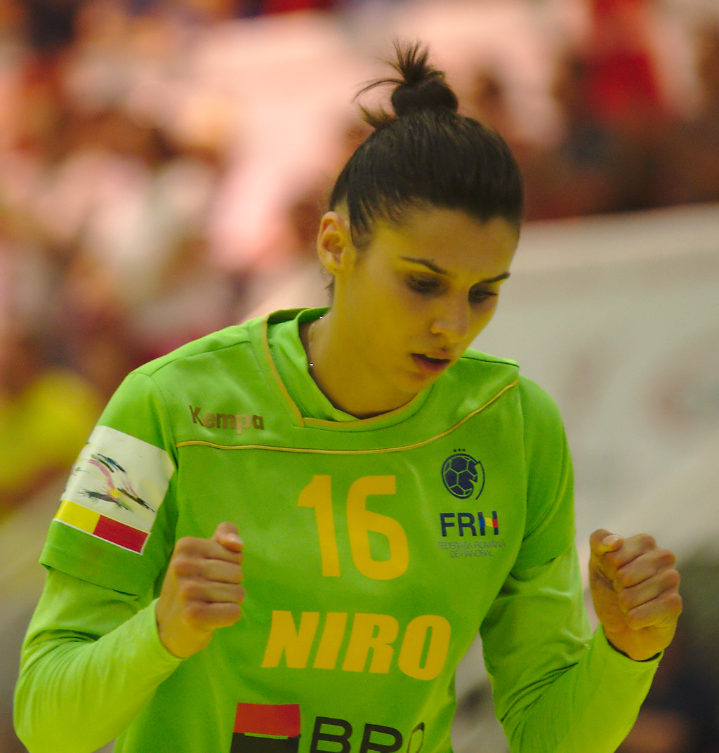 Denisa-Ștefania Dedu